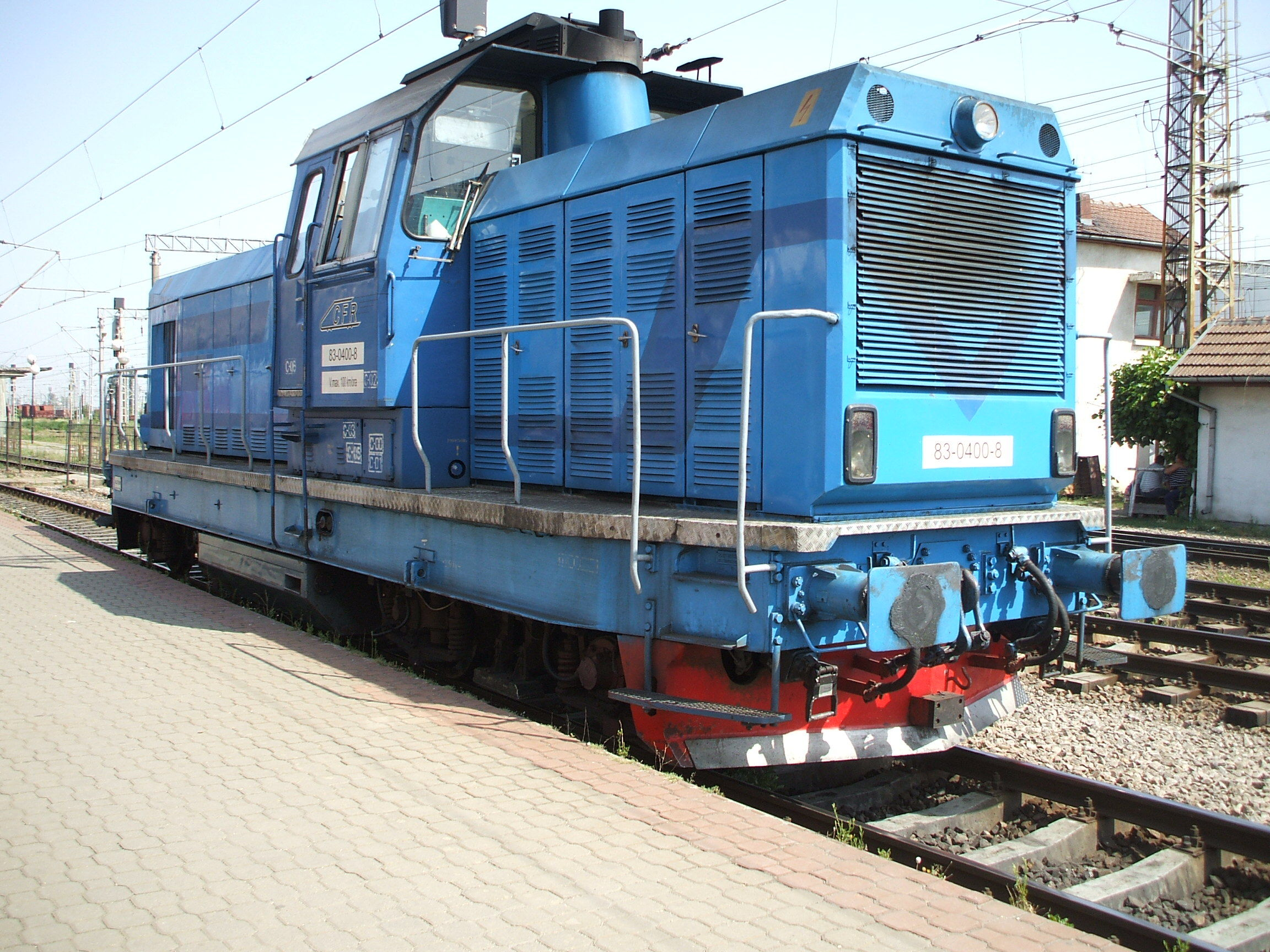 Locomotiva CFR clasa 83